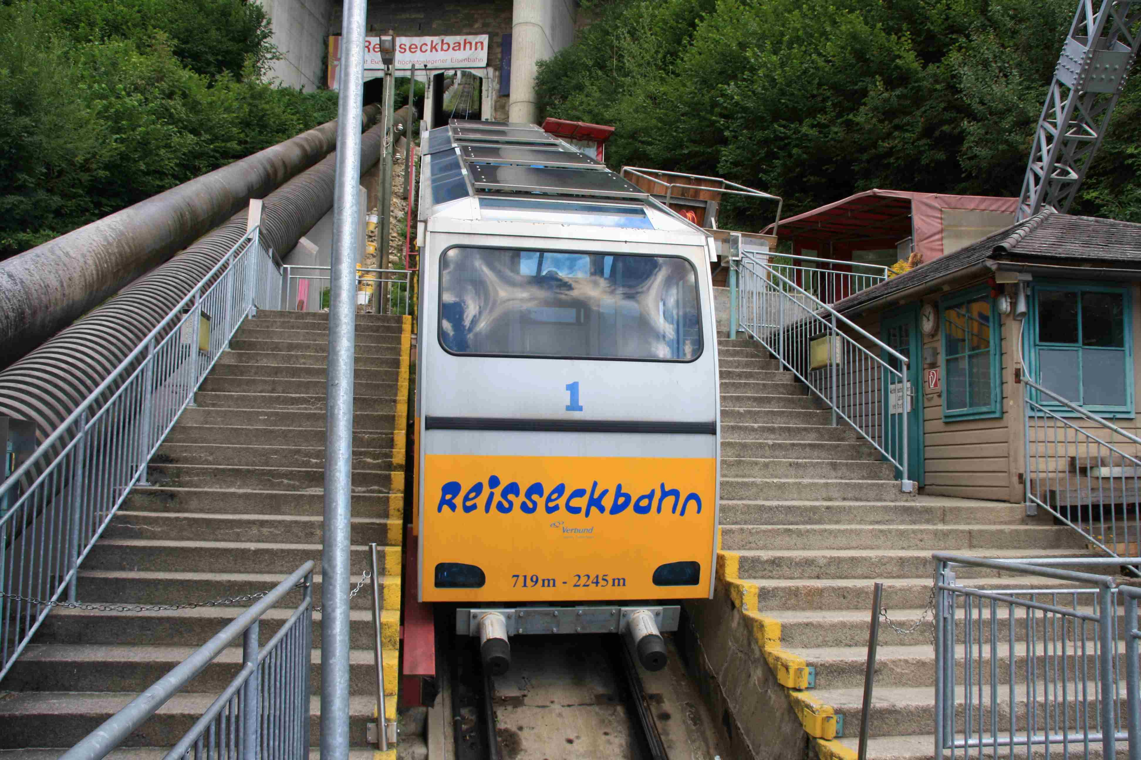 Die Reißeckbahn an der Talstation, links die Wasser-Druckrohre